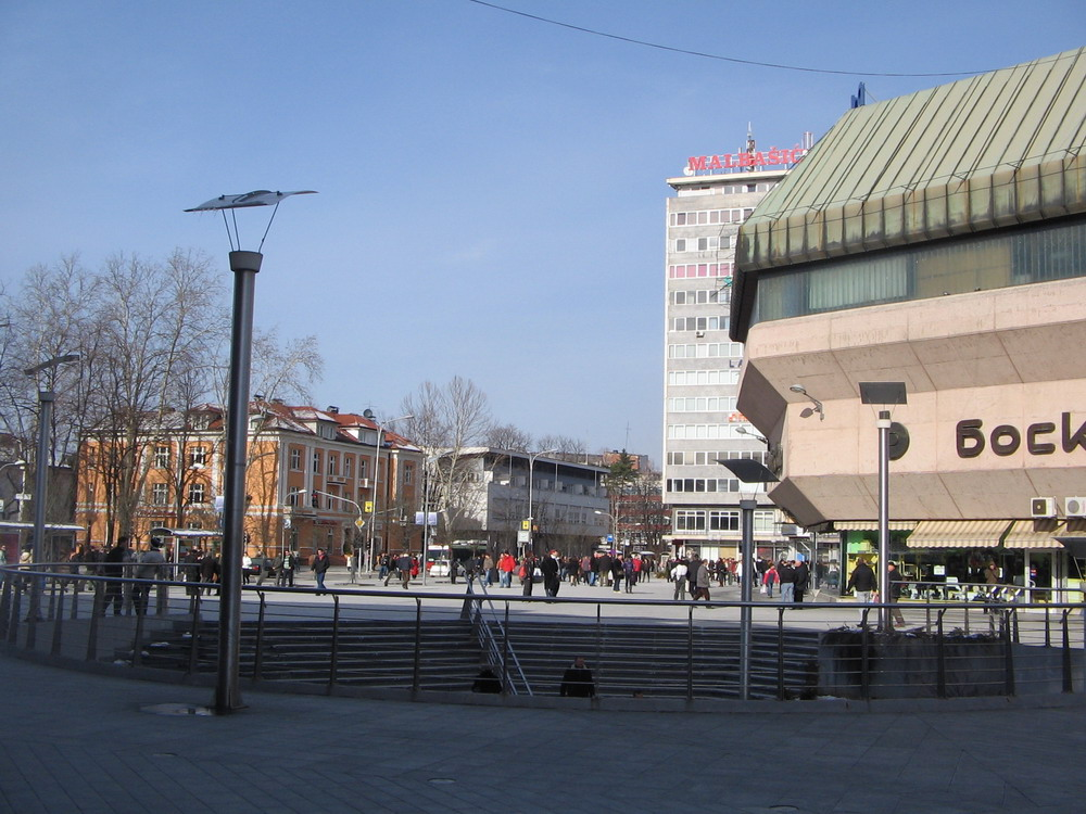 Trg Krajine